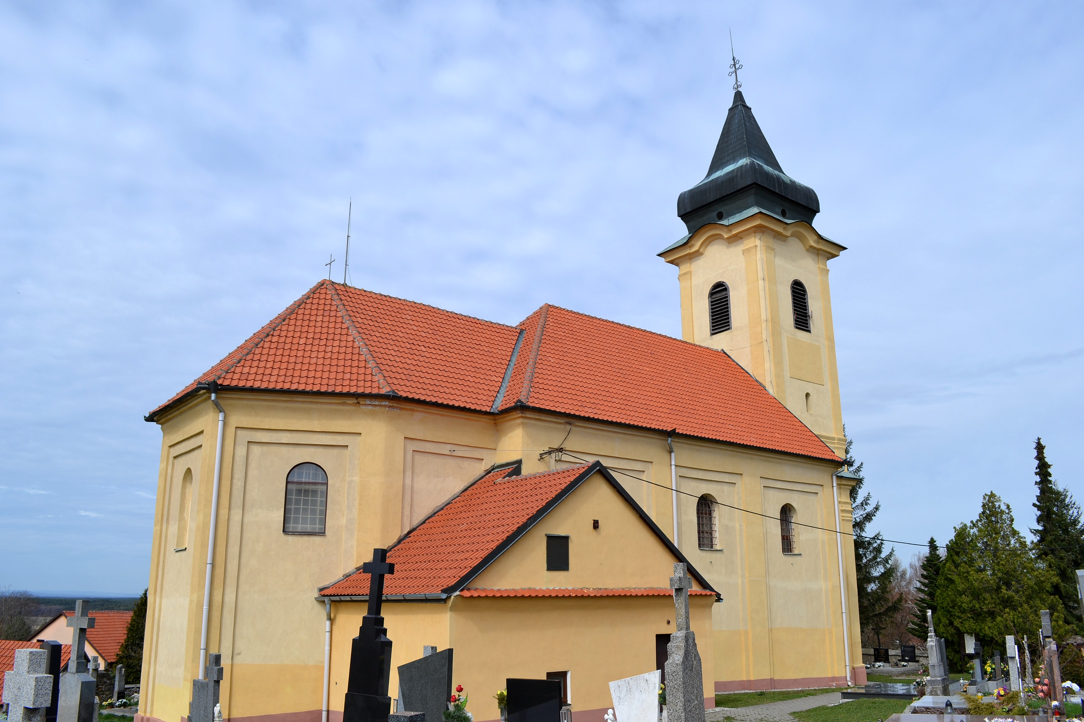 Lakšárska Nová Ves (okr. Senica), Kostol svätého Vavrinca; celkový pohľad